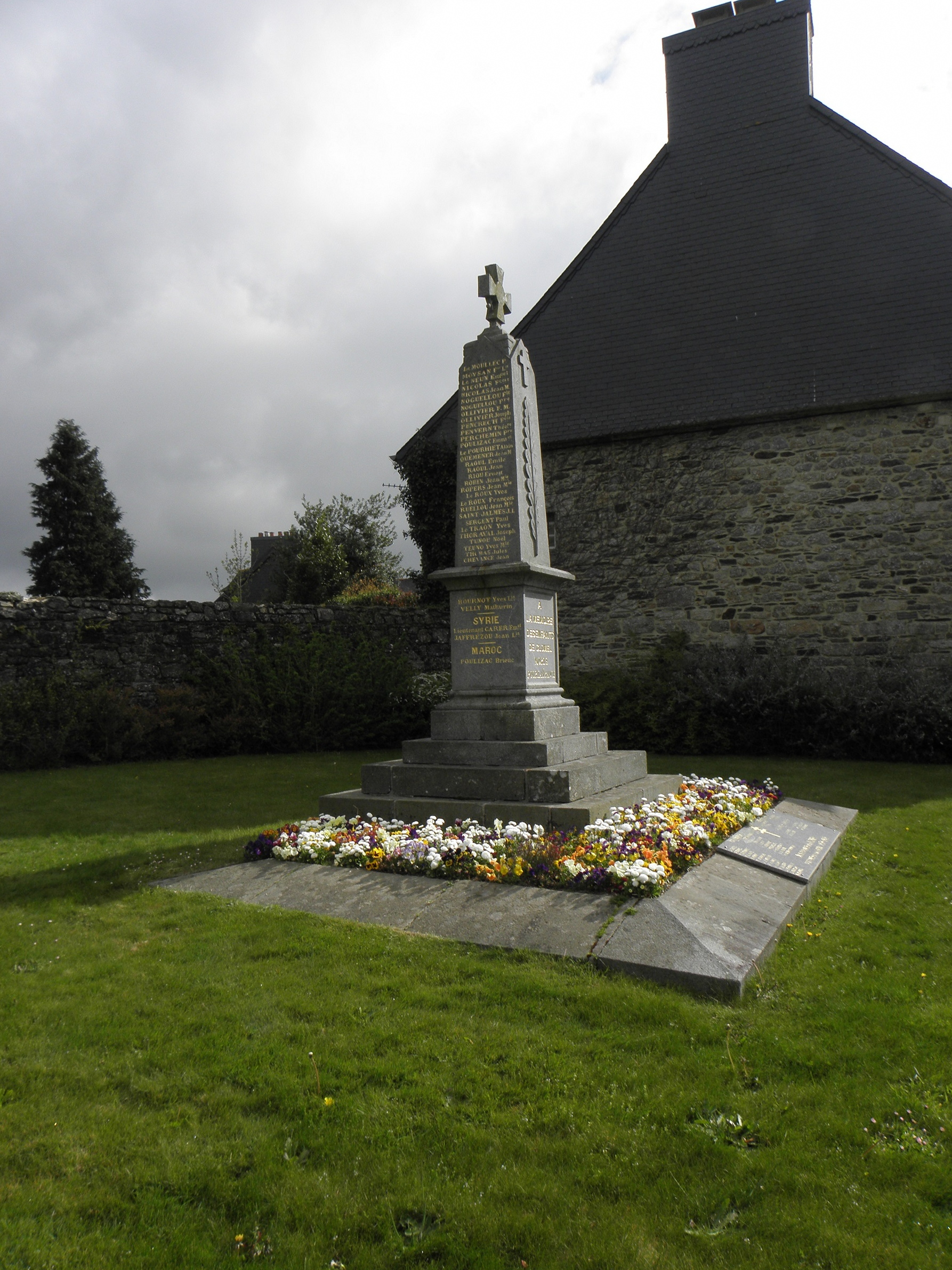 Monument aux morts de Glomel (22).